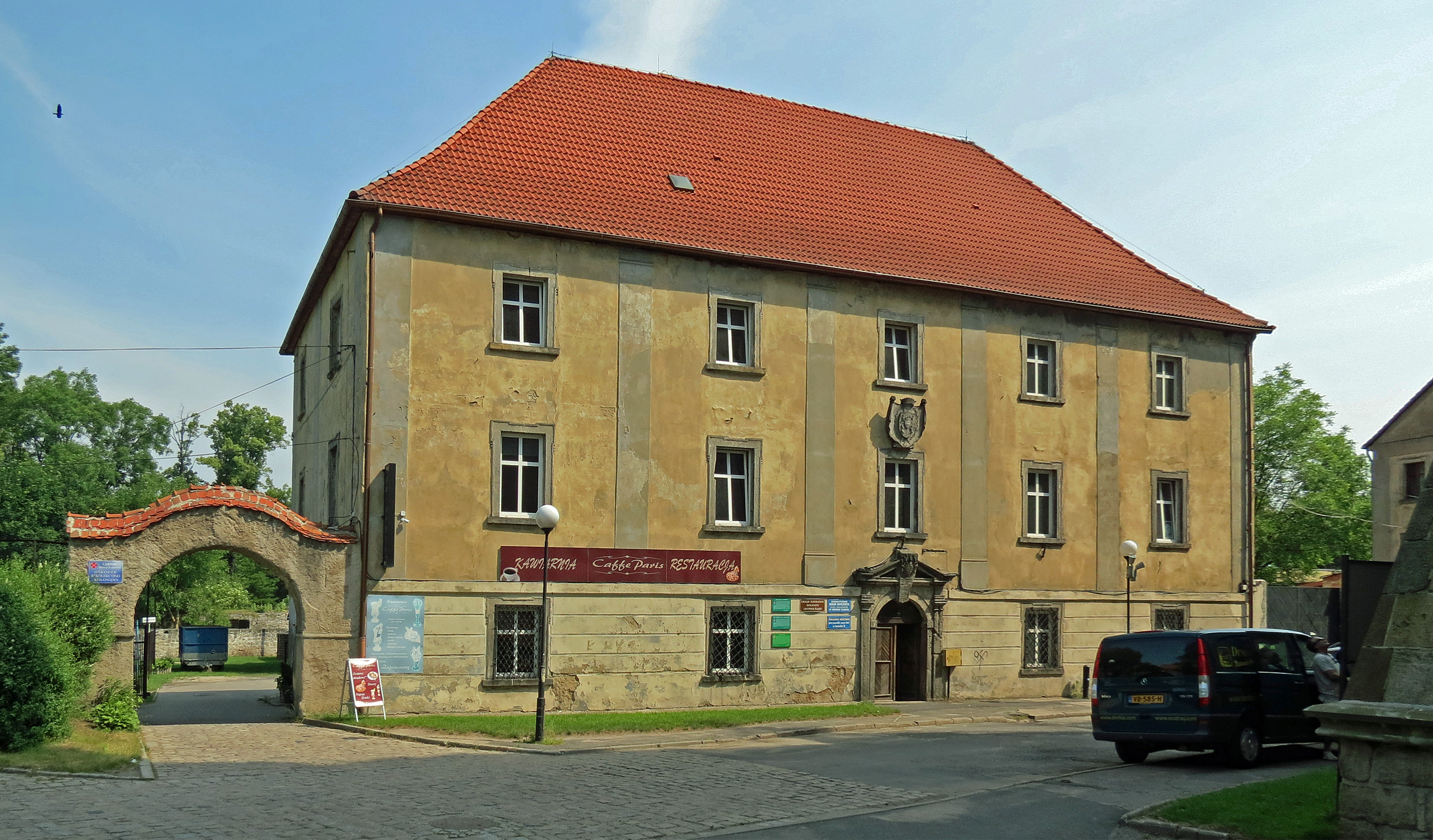 Lwówek Śląski, komandoria joannitów, ob. dom mieszkalny, 1728, 1760